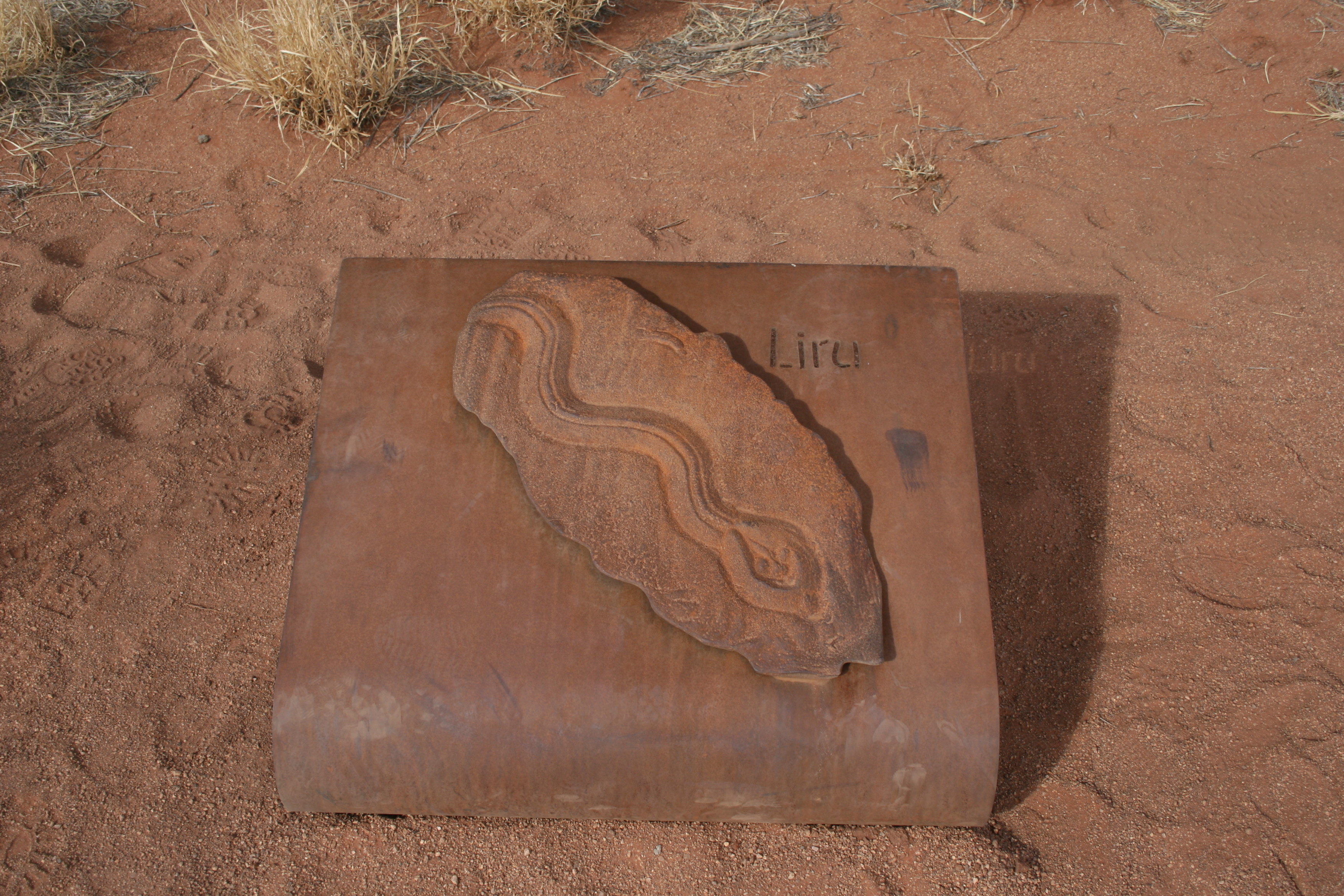 Metall-Hinweis am Uluru, ca. 40 x 40 cm